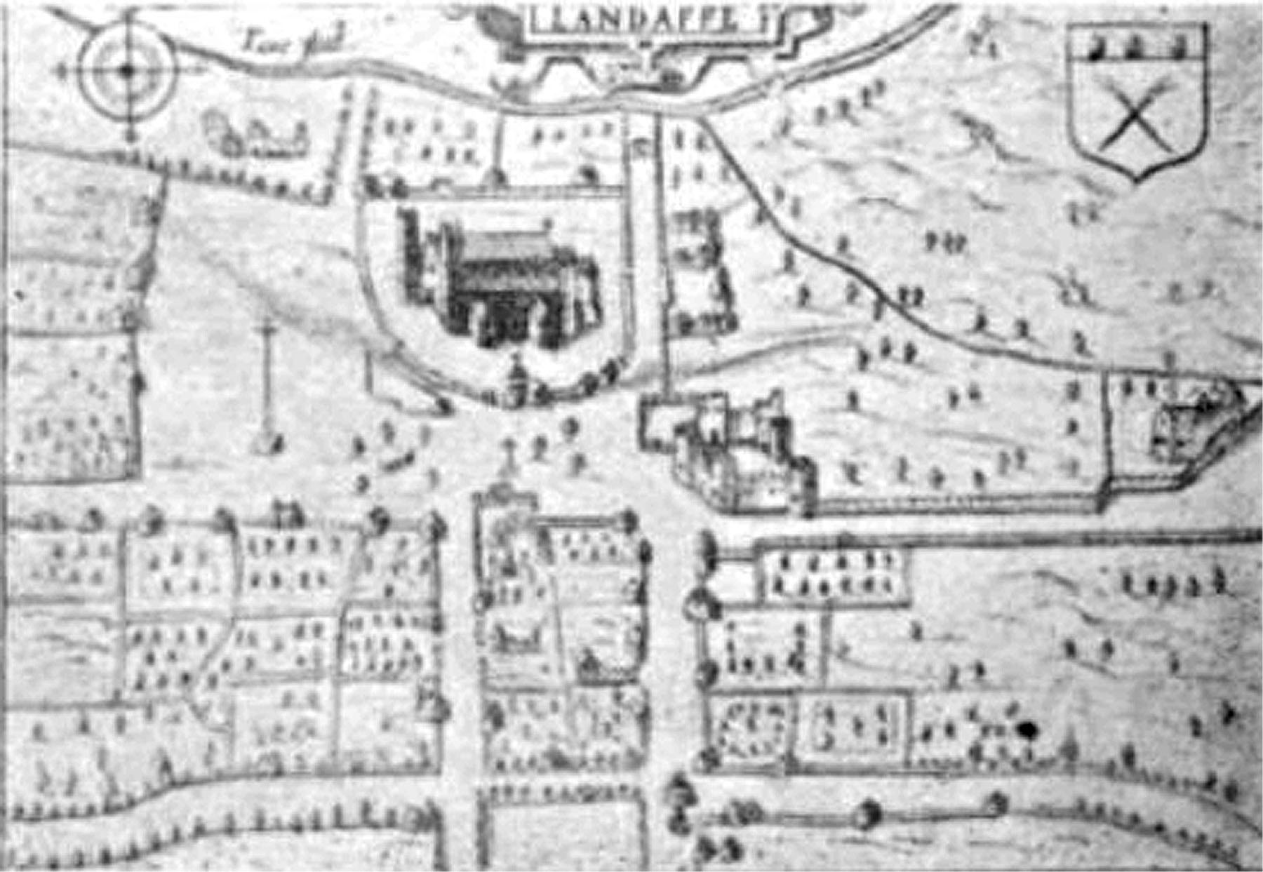 Llandaff, Wales, 1610